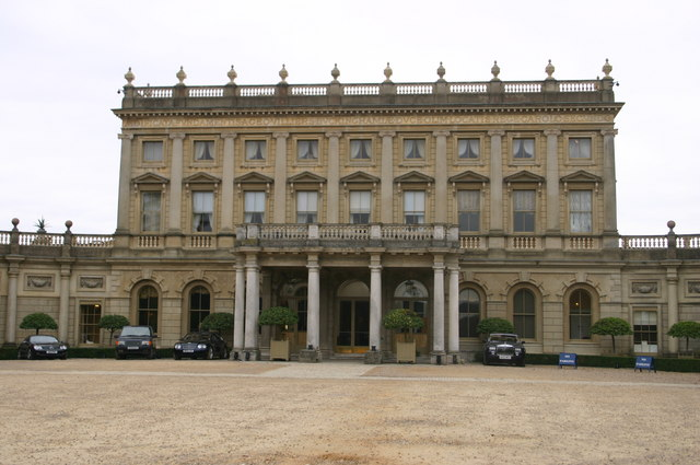 Cliveden House